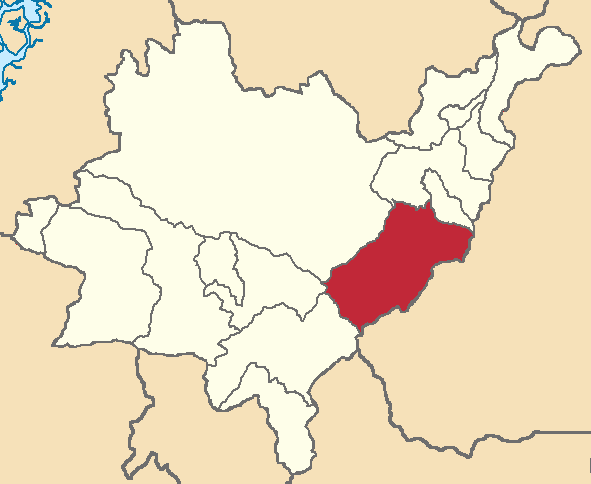 Mapa localizacor del cantón en Azuay, Ecuador